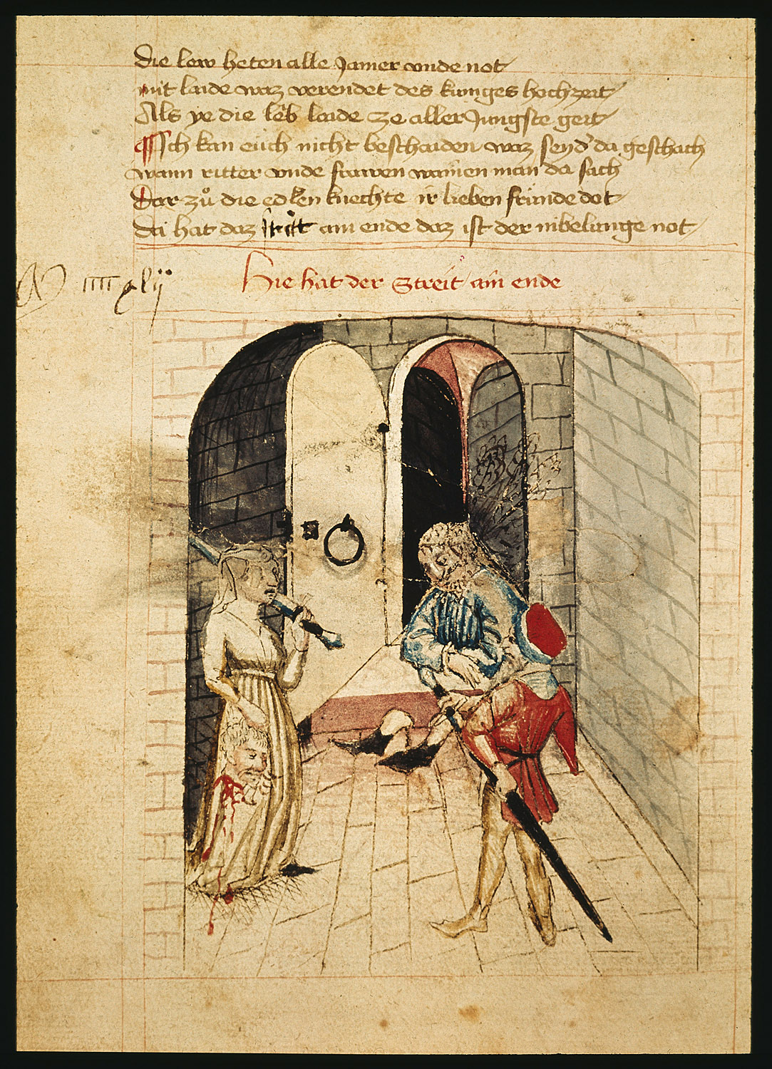 Nibelungenlied. Hundeshagenscher Kodex